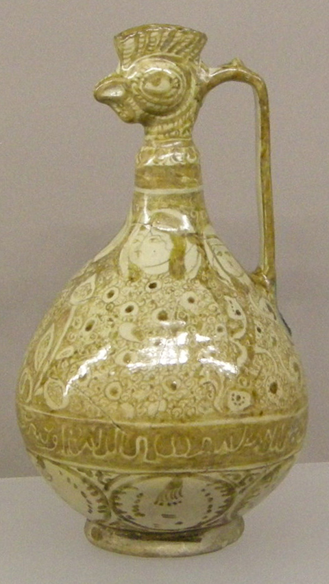 Iran, kashan, brocca, xii-xiii sec